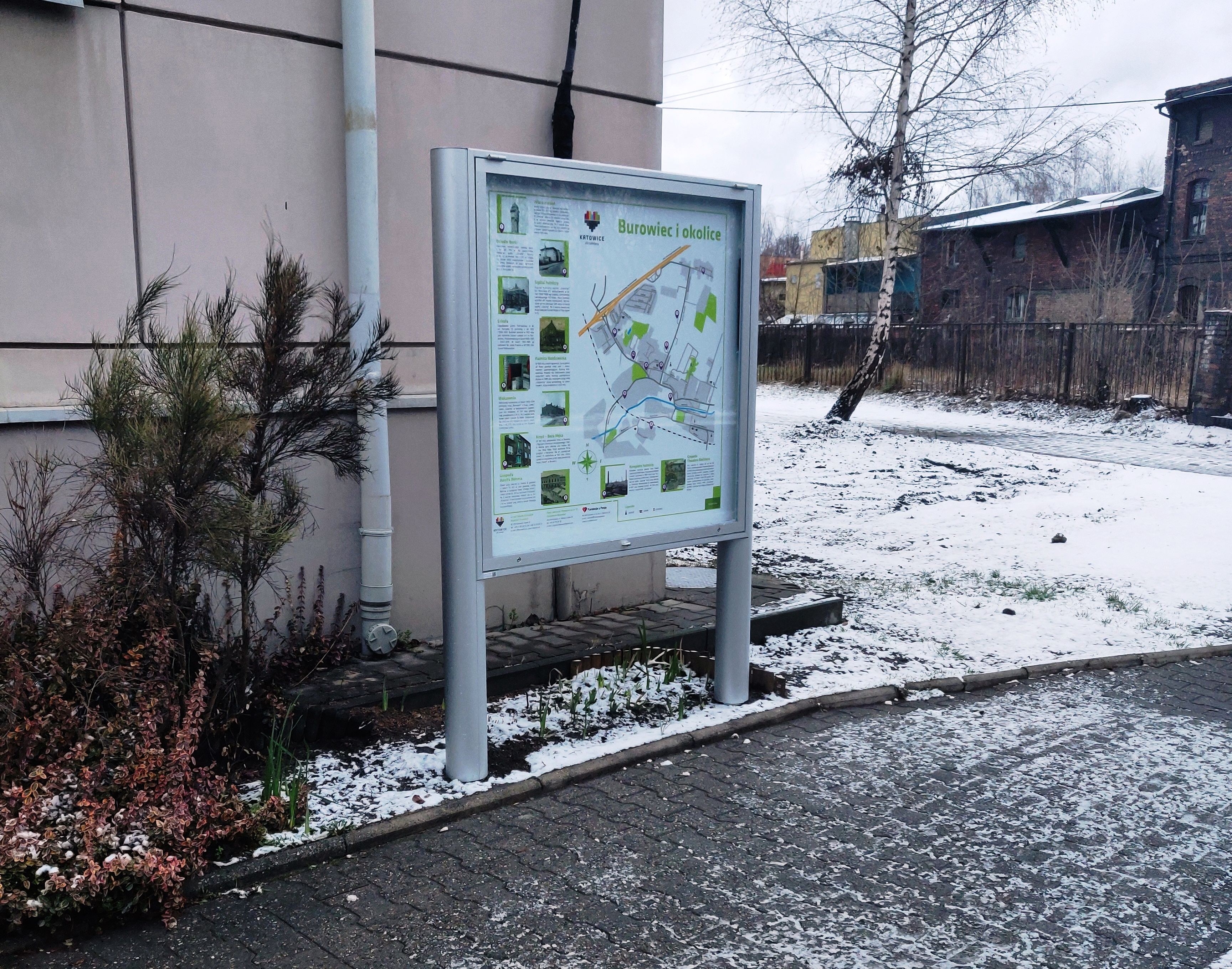 Tablica z historią Burowca zlokalizowana przy ul. gen. J. Hallera 28 w Katowicach